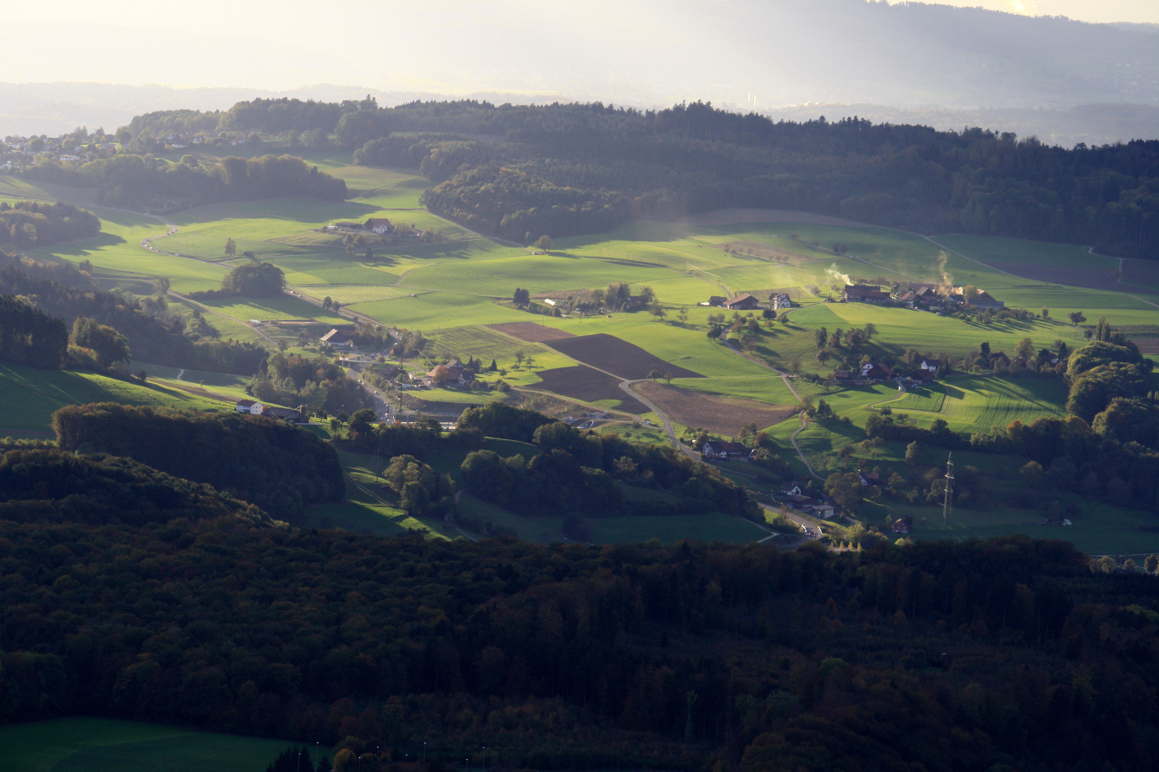 Oberwil-Lieli as seen from Uetliberg Aussichtsturm